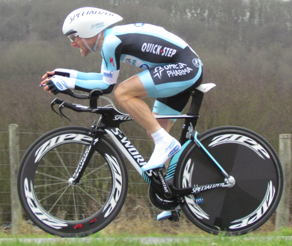 Leipheimer paris nice 2012